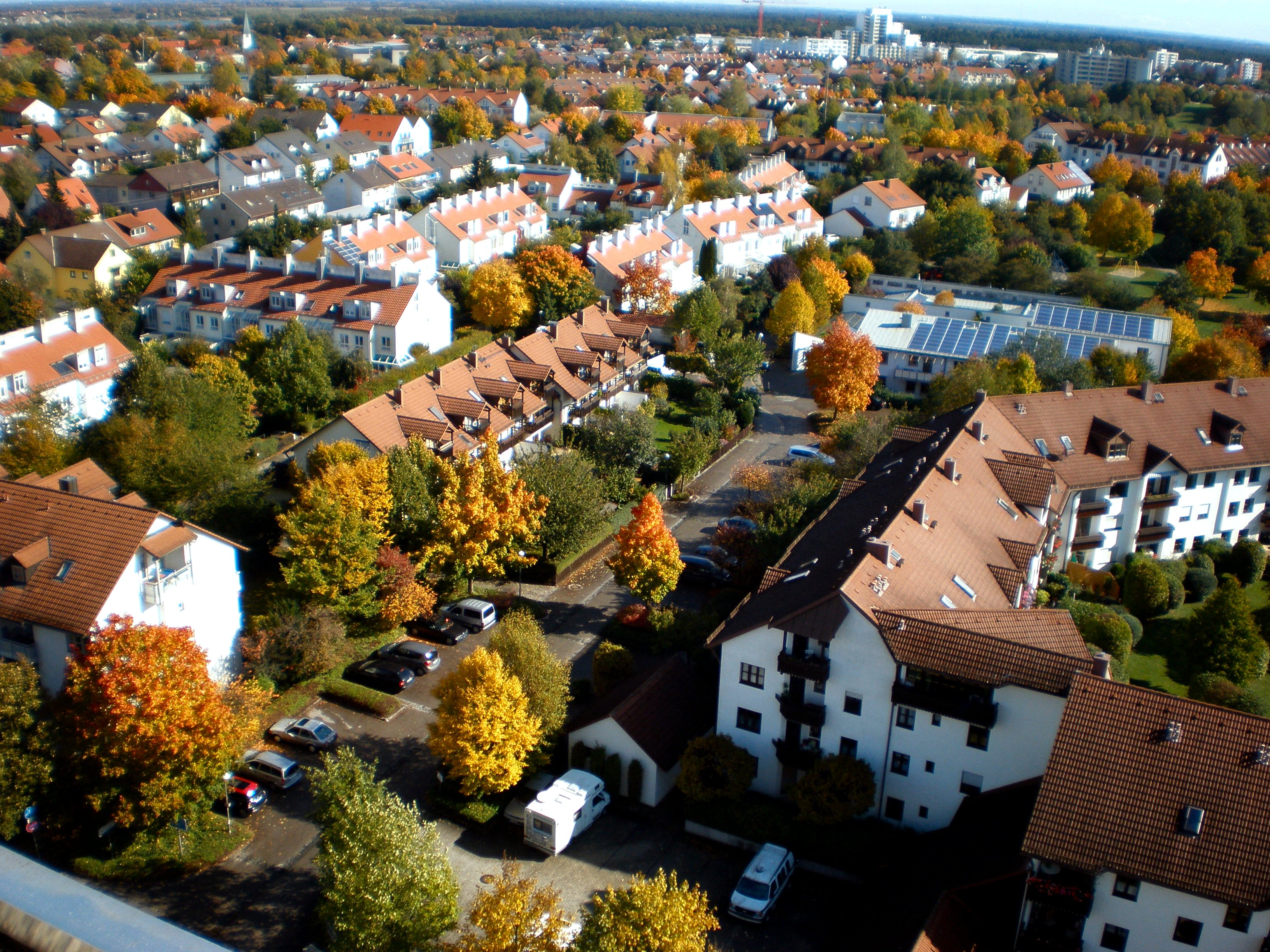 Unterschleißheim 15.10.2013